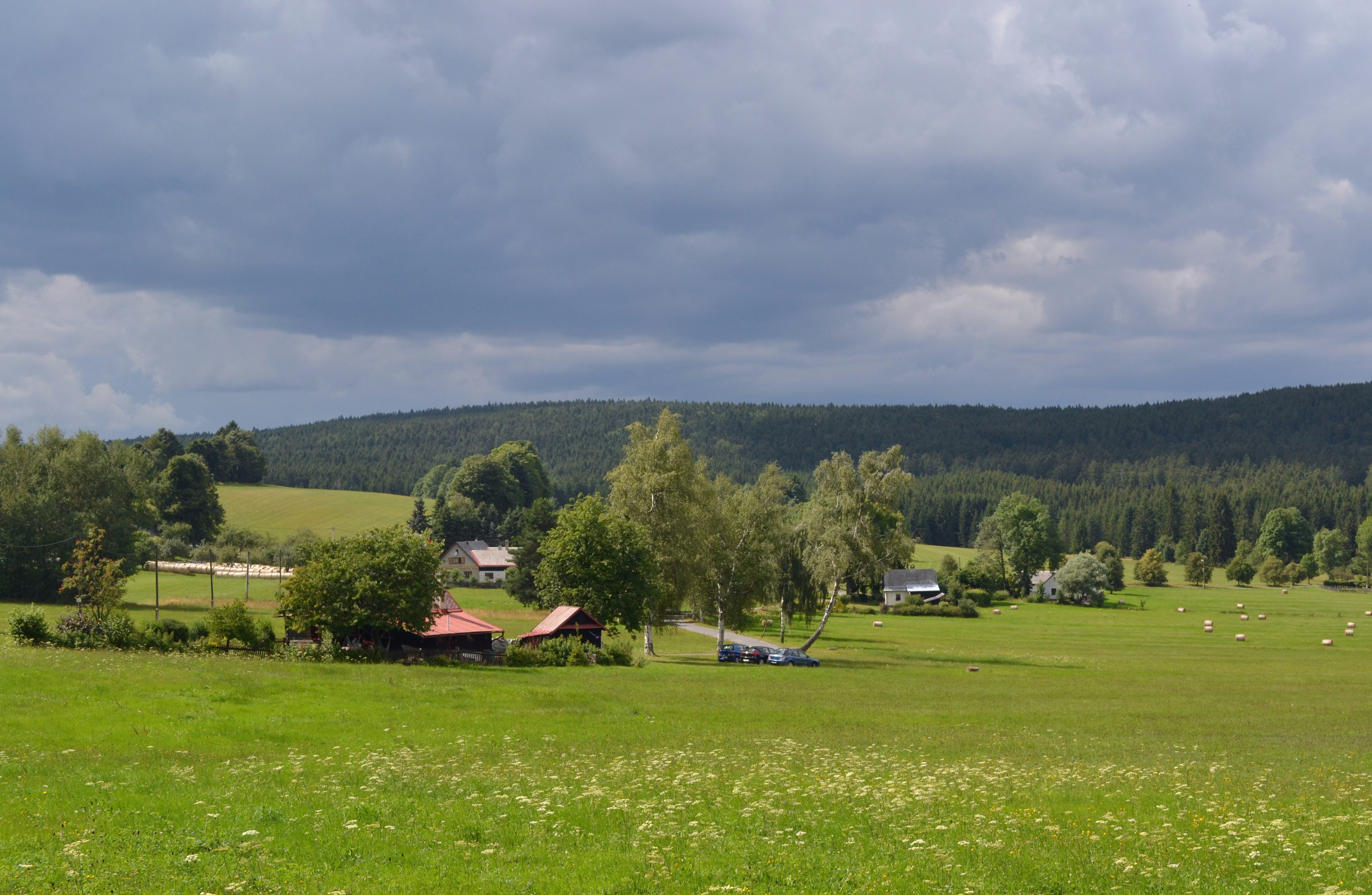 Samotín (Sněžné) - pohled od východu